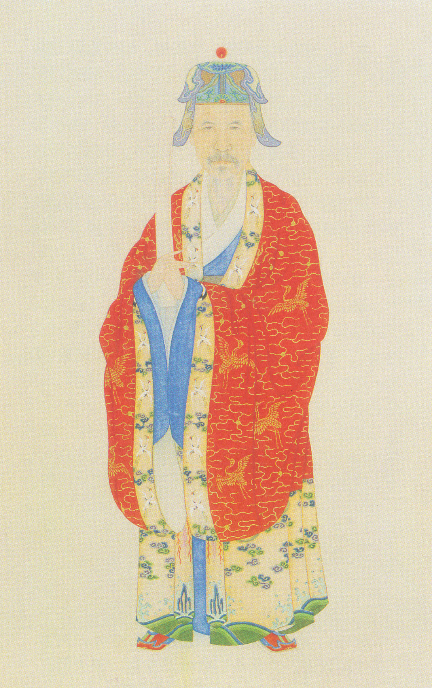 文天祥肖像，葉衍蘭繪